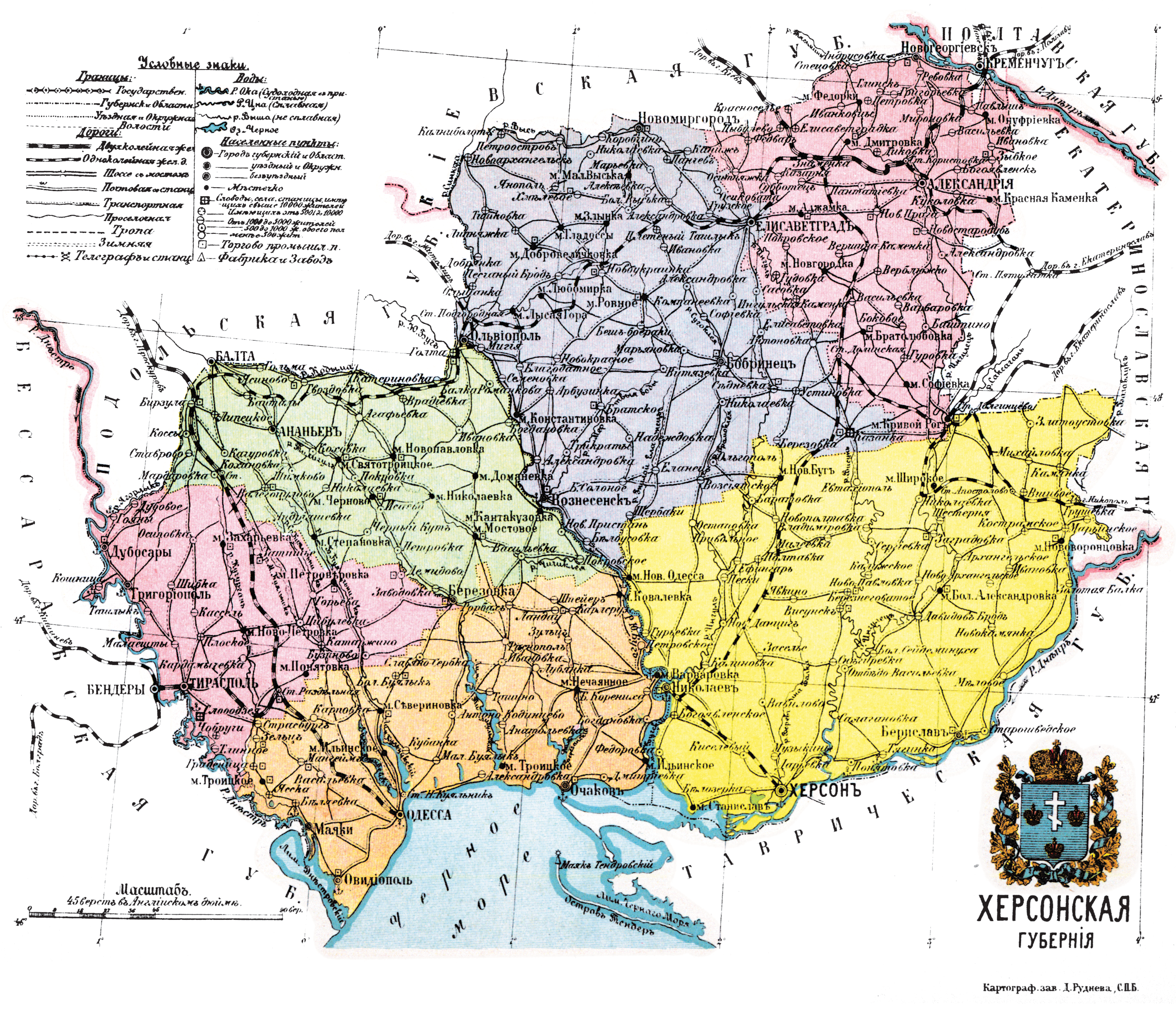 Карта Херсонской губернии, 1913 год